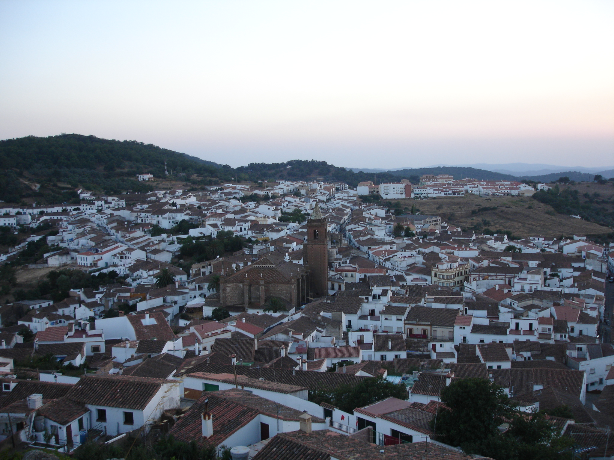 Vista panorámica del pueblo de Cortegana (Huelva, España) desde el Castillo. Fotografía por comakut.